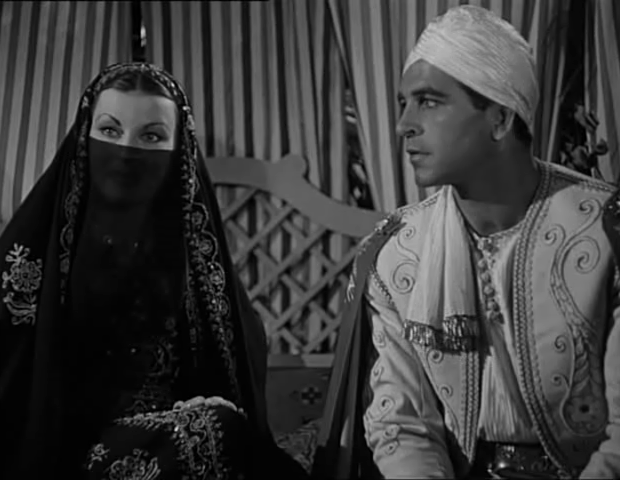 Silvana Pampanini e Enzo Fiermonte in una scena del film Lo sparviero del Nilo (1950).